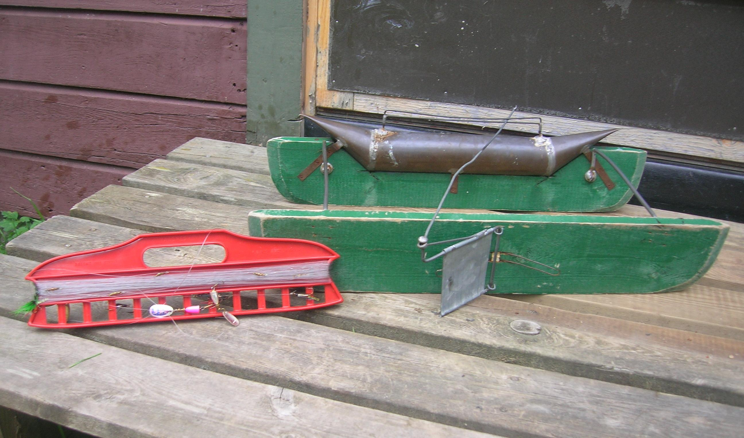 Oter med dobbel fjøl og tilhørende line med seks fluer for bruk i ferskvann, antakelig fra 1960-tallet. Kan vendes ved hjelp av metall plata som er festet på siden.